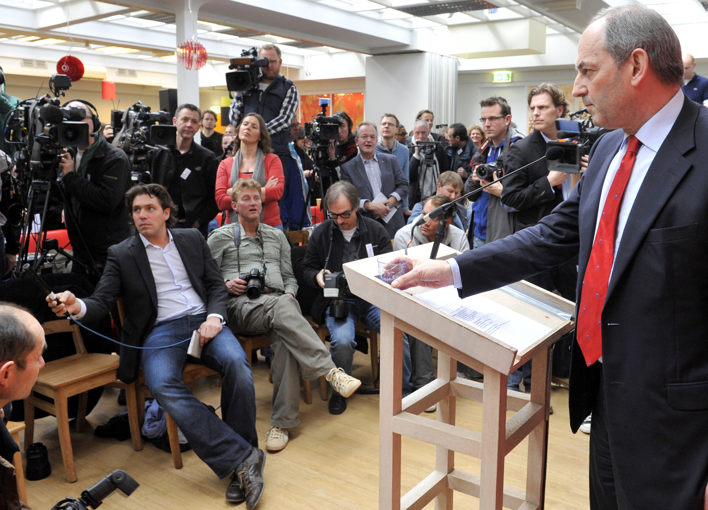 AMSTERDAM - Job Cohen legt per direct zijn functie neer als burgemeester van Amsterdam om kandidaat-lijsttrekker voor de PvdA bij de verkiezingen in juni te worden. Cohen gaf vrijdagmiddag in een persconferentie een toelichting op zijn besluit.